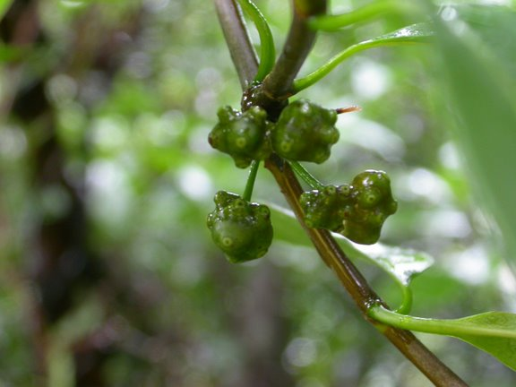 傘花藤ＥＴ果實